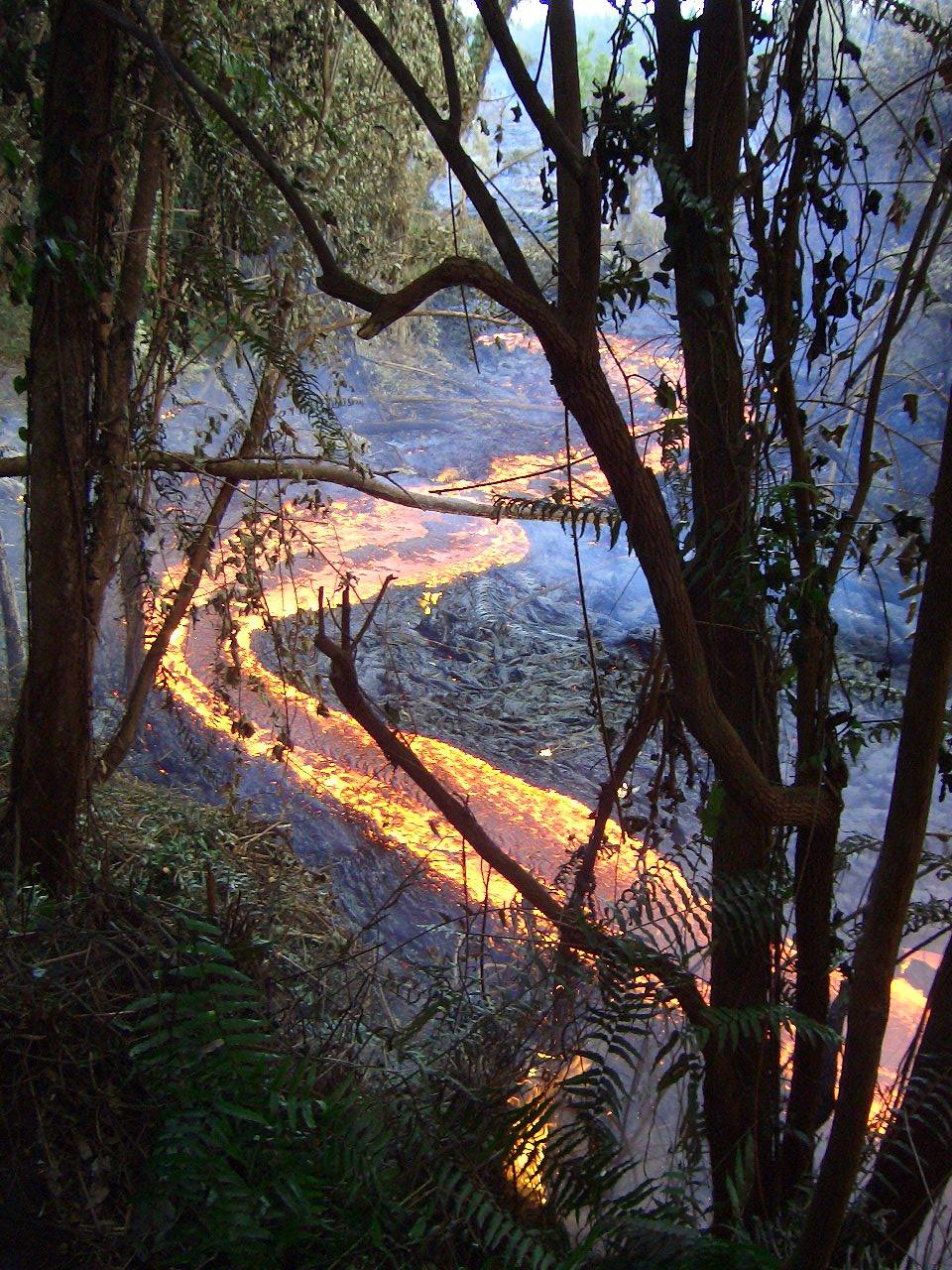 La Réunion, 2004